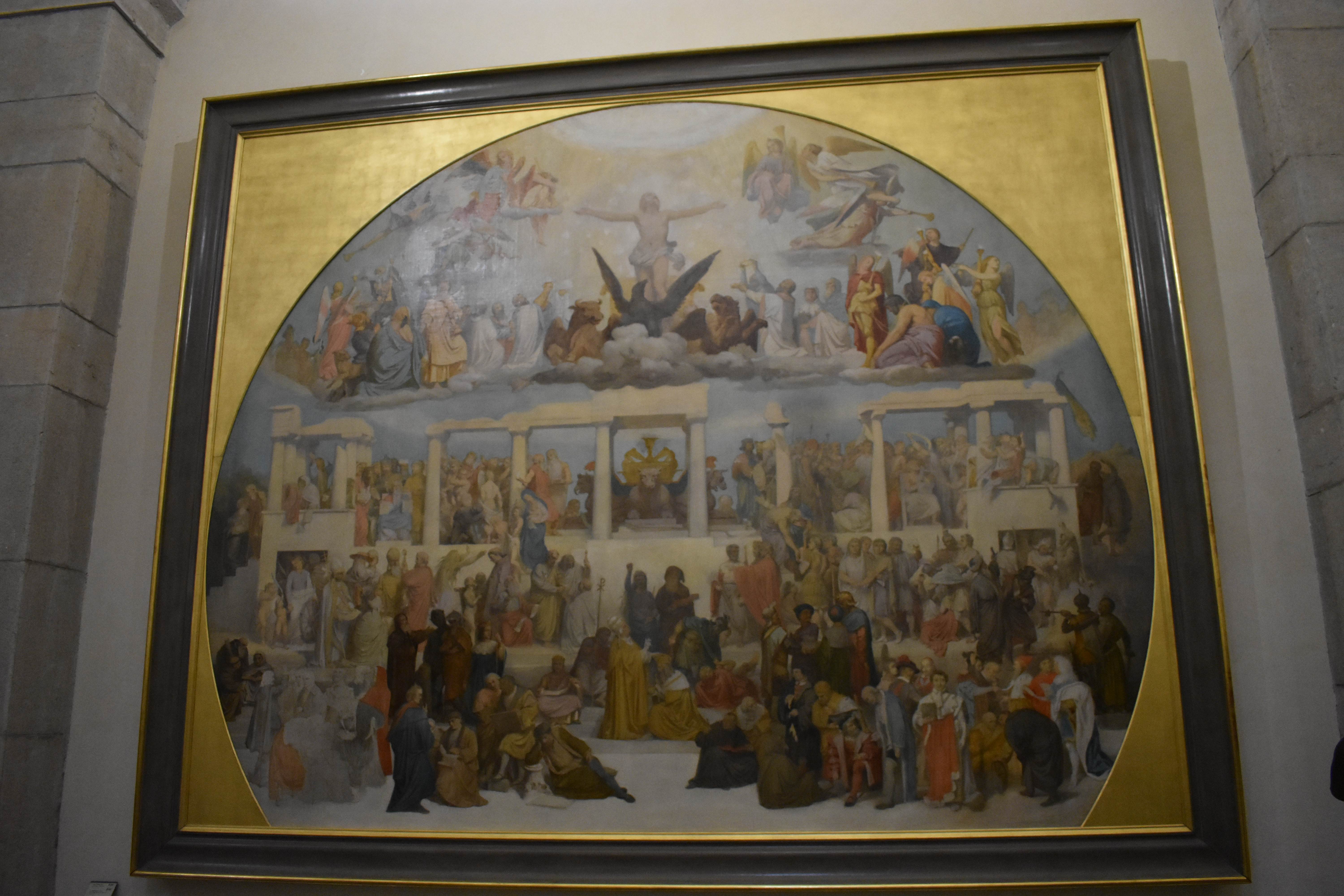 Prise au Musée des beaux-arts de Lyon le 13 mai 2018